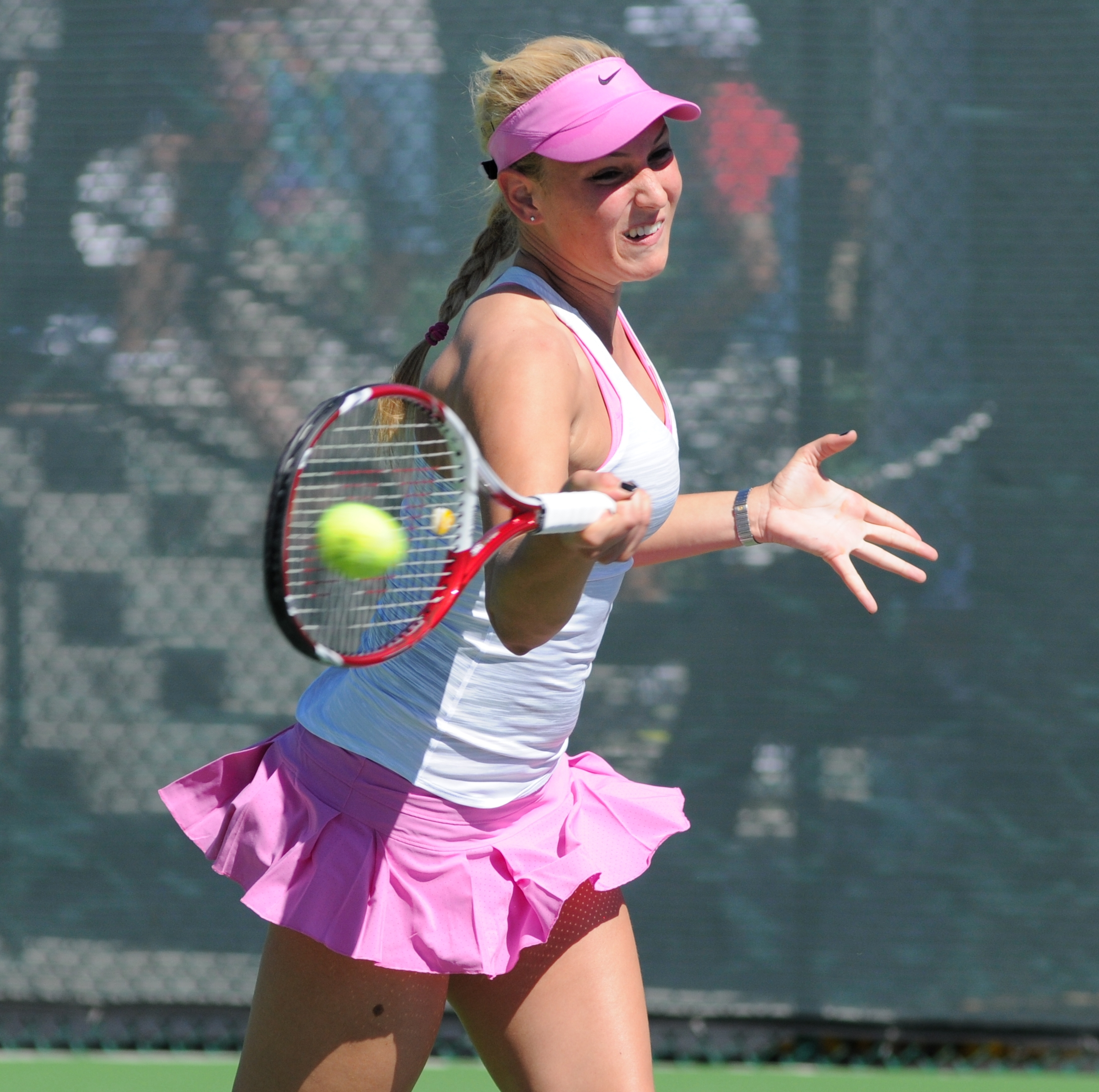 2014 BNP Paribas Open